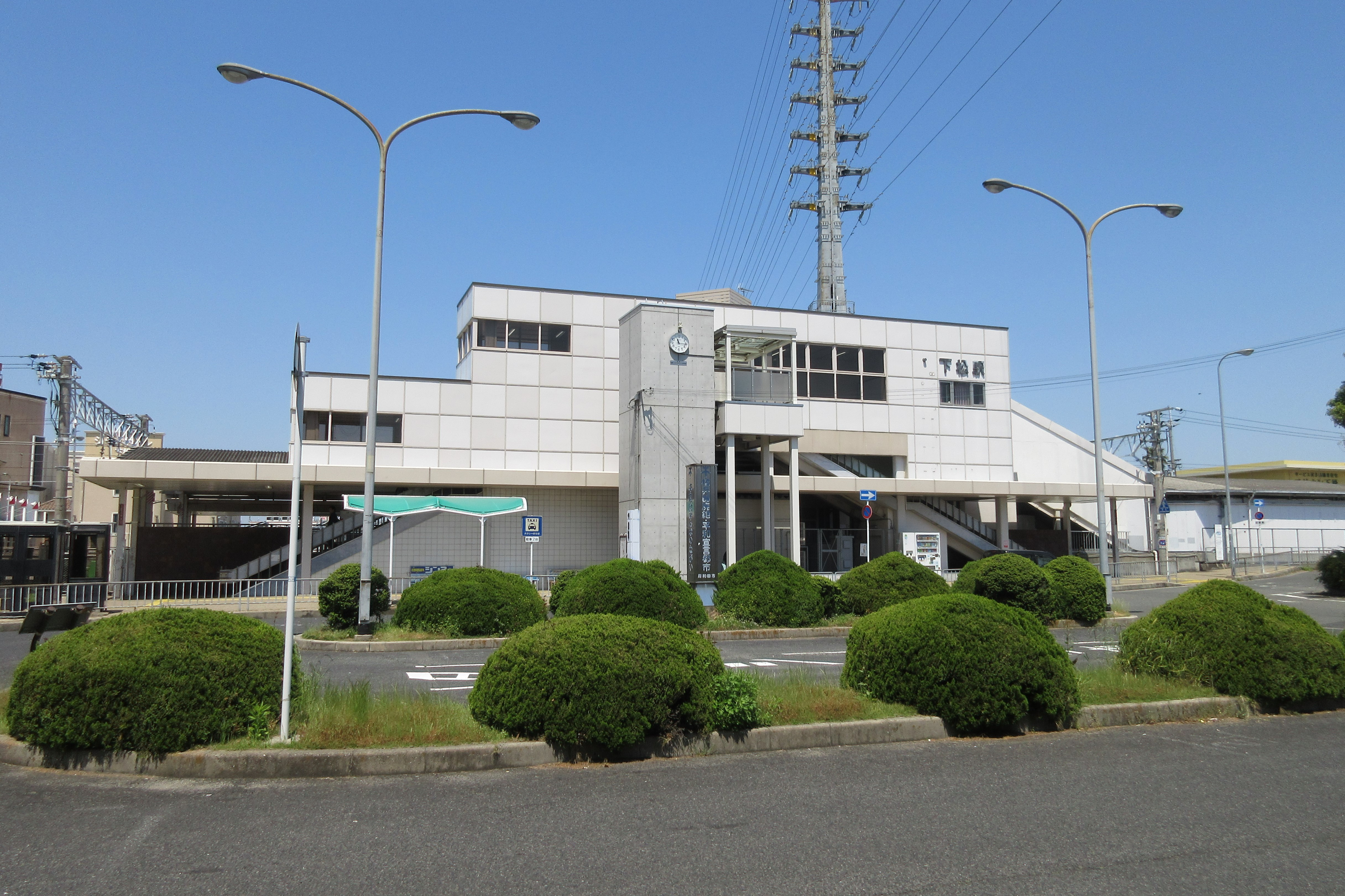 JR下松駅